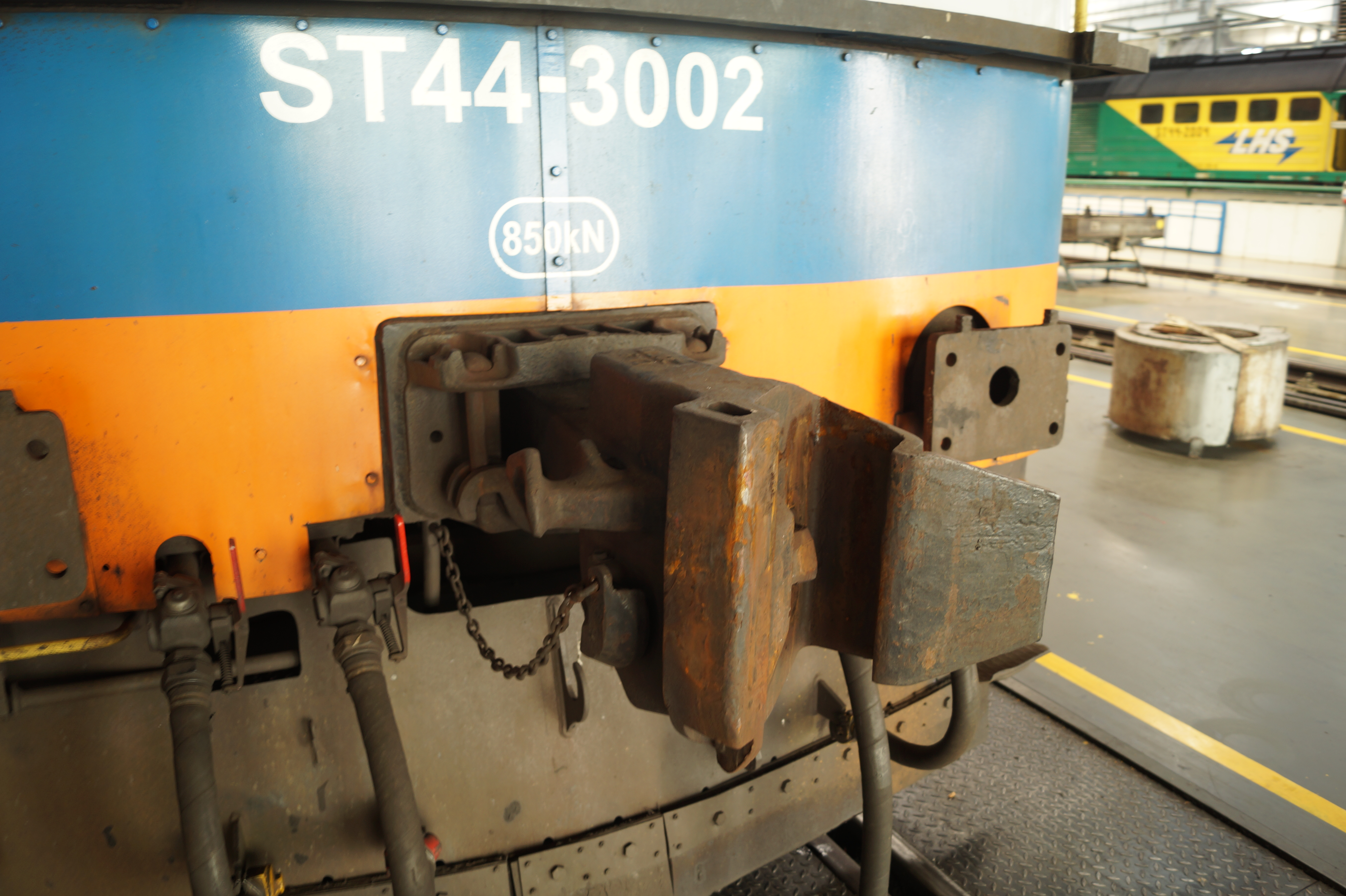 Sprzęg SA-3 na lokomotywie ST44-3002 należącej do PKP LHS